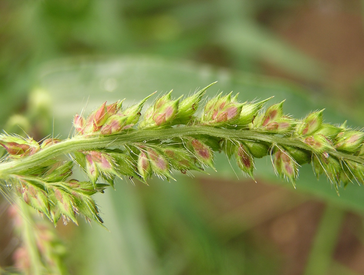 Echinochloa crus-galli am Rande eines Maisfeldes bei Neuss (in Deutschland). Detail eines Teilblütenstandes.